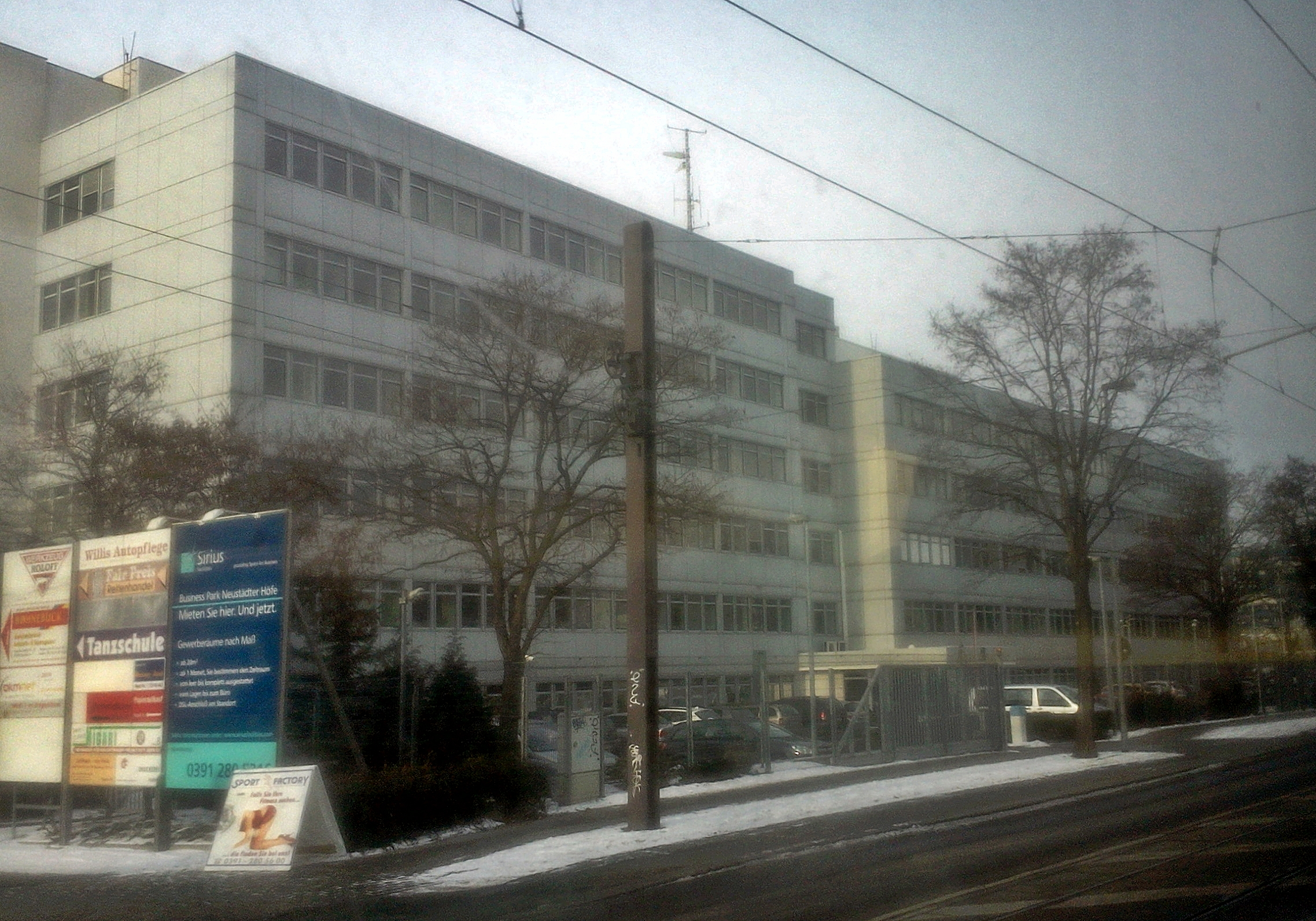 Landeskriminalamt Magdeburg Lübecker Straße